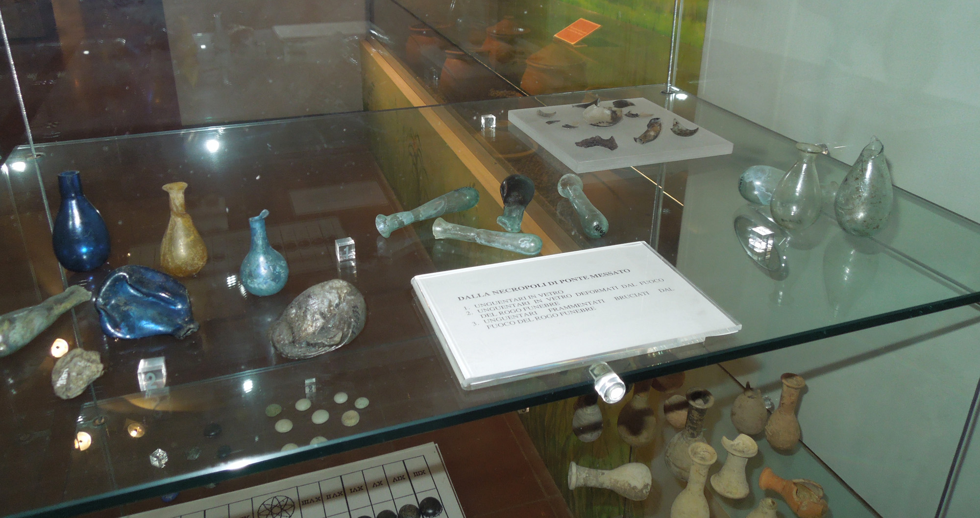 Unguentari provenienti dalla Necropoli di Ponte Messato a Teramo e custoditi presso il Civico Museo archeologico Francesco Savini.